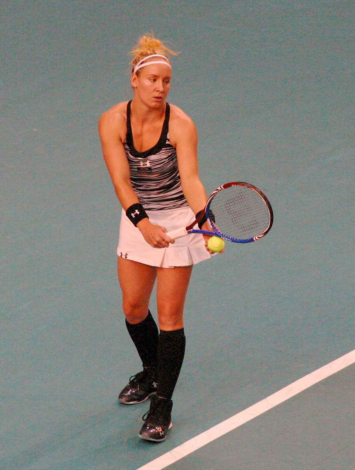 Bethanie Mattek-Sands en demi-finale de l'open Gdf Suez